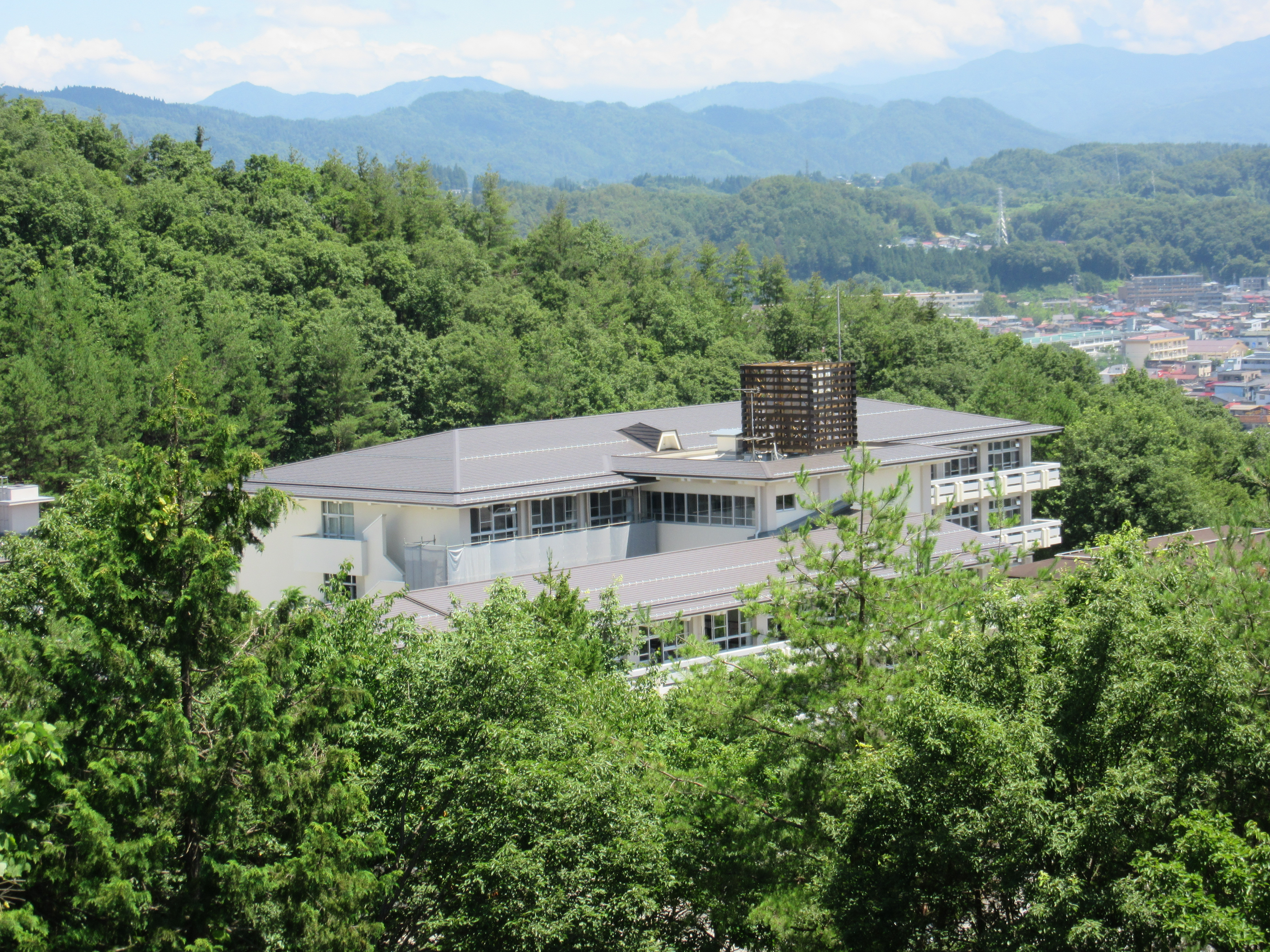 飛騨高山高等学校岡本校舎